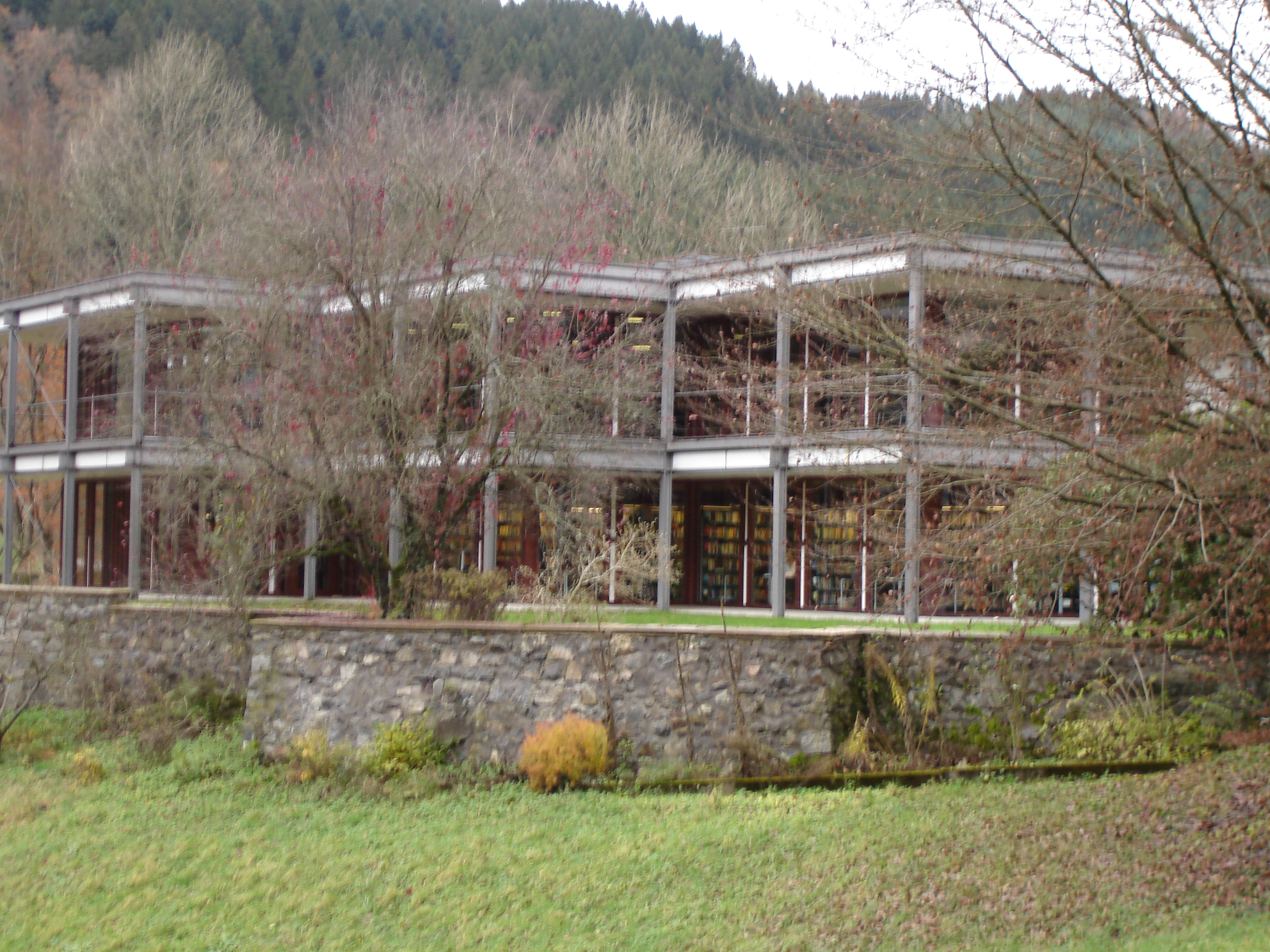 Beschreibung: Bibliothek des Mathematischen Forschungsinstituts Oberwolfach Quelle: selbst erstellt Datum: 23. November 2006 Urheber: Benutzer:Scherben